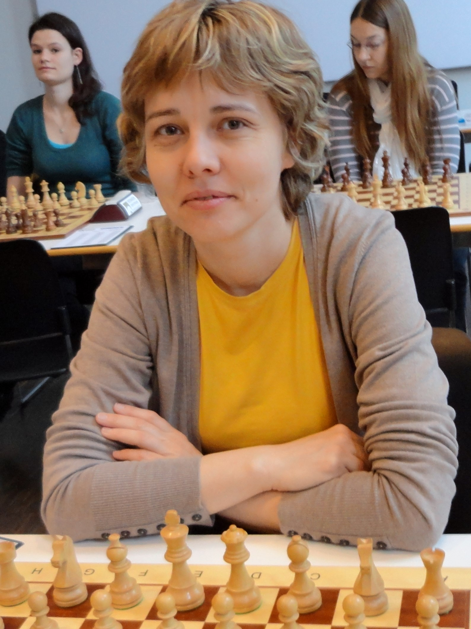 Barbara Jaracz, 2013 in Baden-Baden bei Schachbundesliga der Frauen